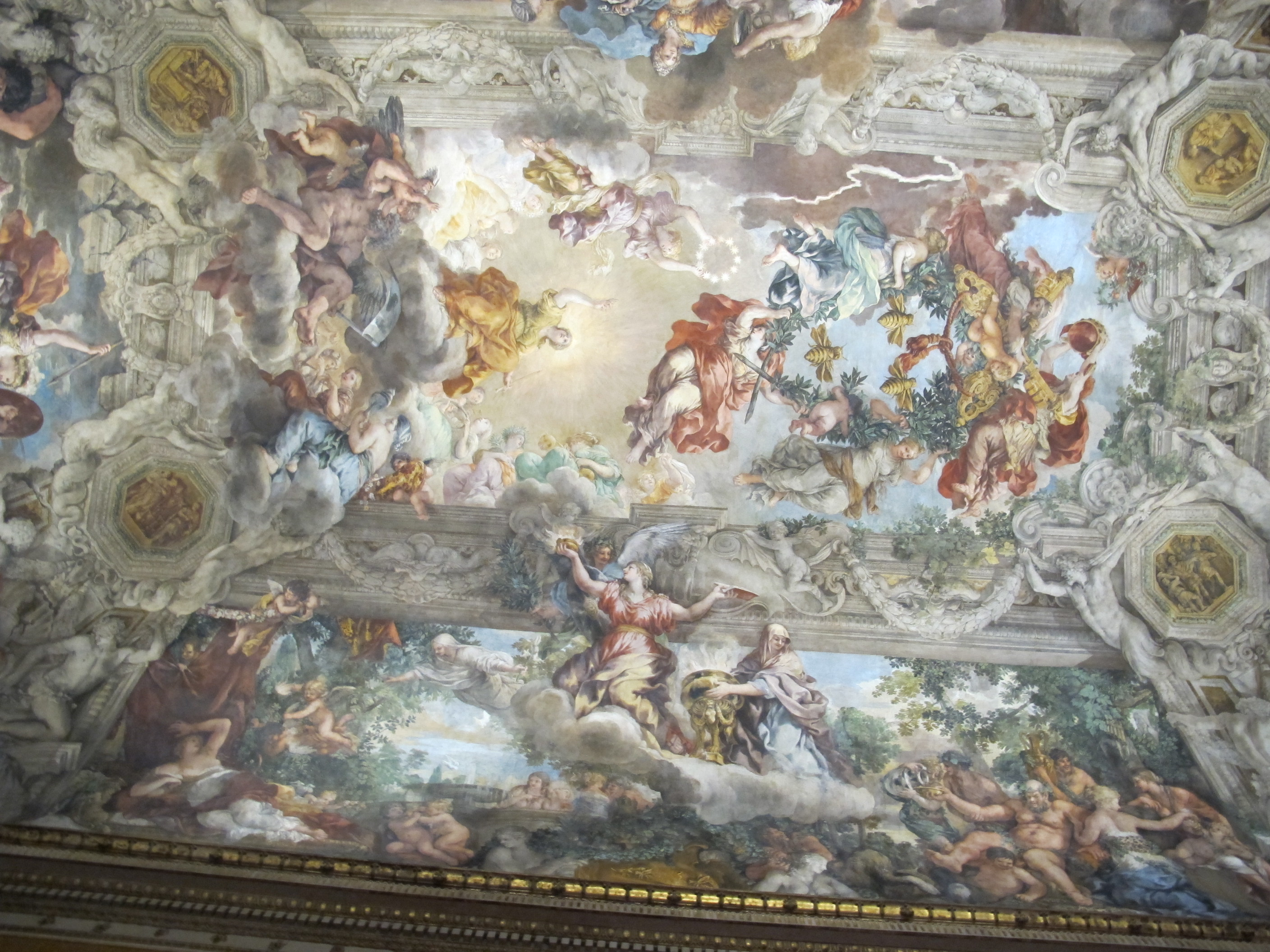 Palazzo barberini, salone di pietro da cortona